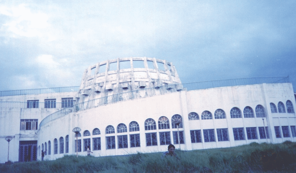 Kaunsil Nok in wikimedia:incubator:Khumulwng.